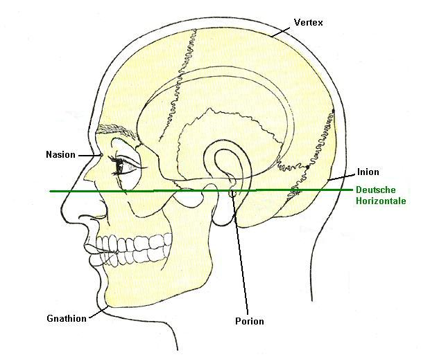 Kraniometrische Meßpunkte am Schädel Von: modifiziert und neu beschriftet --MBq 11:43, 10. Dez 2005 (CET)